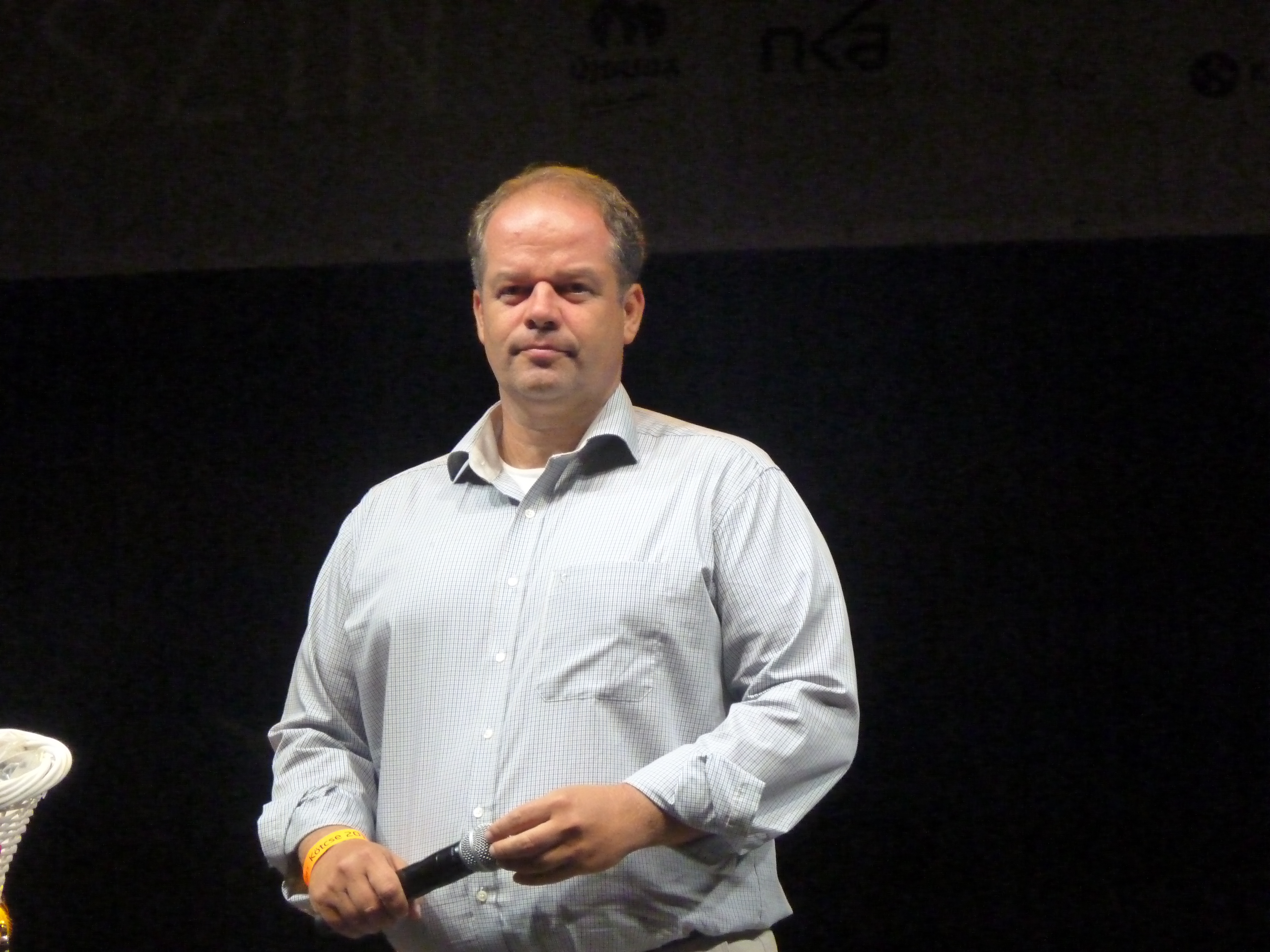 A felvételek 2014. szeptember 6-án szombaton készültek. A Budapesti Műszaki Egyetem főbejárata előtt felállított színpad. Hoffmann Tamás, Újbuda polgármestere. 1. Cseh Tamás Nap Újbudán. Hoffmann Tamás és a Kult11 Egyesület a Bartók Béla úti kultúrális negyed fejlesztéséről, a Cseh Tamás Napról beszélt. Címkék: Hoffmann Tamás 1. Cseh Tamás Nap Hoffmann Tamás polgármester Újbuda 2014 Harcsa Veronika Gyémánt Bálint Andrew J. Jin-Bip jazz alternative rock Timeline Források: Cseh Tamás Nap Újbudán Facebook: A38 Kult11 Egyesület ©© Derzsi Elekes Andor, Budapest 2014, You are authorised to use these photos and vids under Creative Commons – even for commercial, for profit purposes. Photos must be attributed to Derzsi Elekes Andor. All of the photos and vids in the Metapolisz DVD line are under Creative Commons and can be used even for commercial – for profit – purposes. Recommended Citation Derzsi Elekes Andor: Metapolisz DVD line